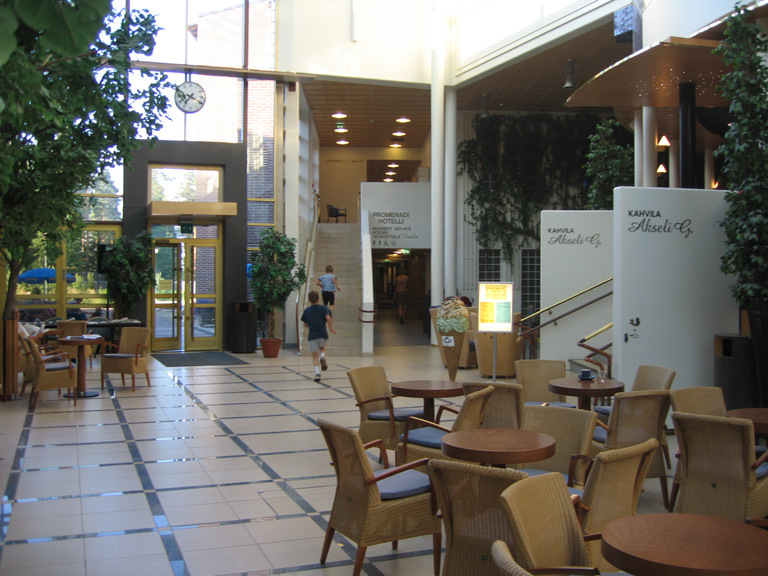 Imatran Kylpyla - Hotel inside